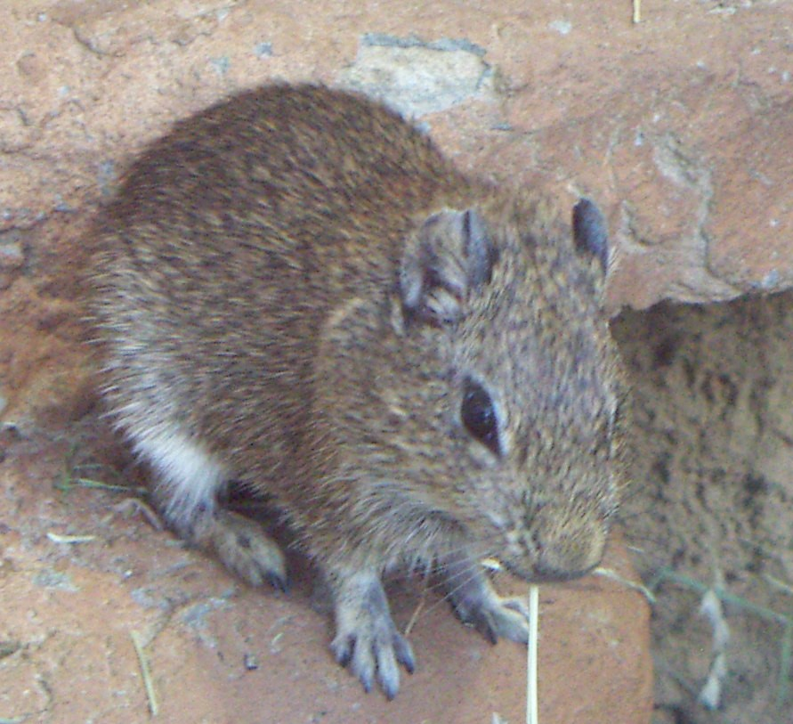 Galea monasteriensis Solmsdorff & Kock & Hohoff & Sachser, 2004 (Münstersches Meerschweinchen) in the zoo of Münster (Westphalia, Germany)